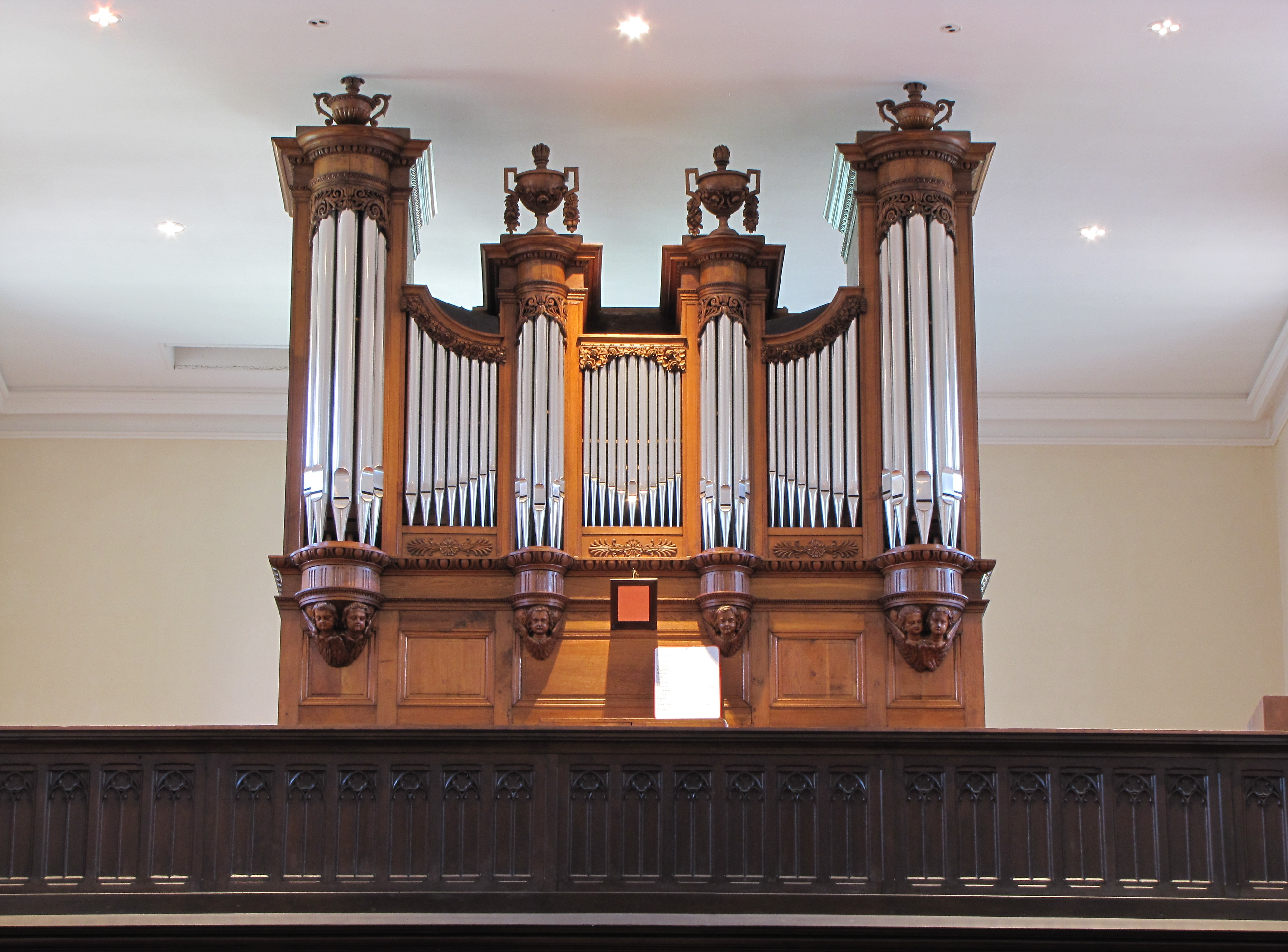 Alsace, Haut-Rhin, Église Saint-Sébastien de Soultzmatt (PA00085689, IA68004357).Orgue Callinet (1837): This object is classé Monument Historique in the base Palissy, database of the French furniture patrimony of the French ministry of culture, under the references PM68000944 and IM68007669. This object is classé Monument Historique in the base Palissy, database of the French furniture patrimony of the French ministry of culture, under the references buffet PM68000369 buffet and instrument PM68000730 instrument.